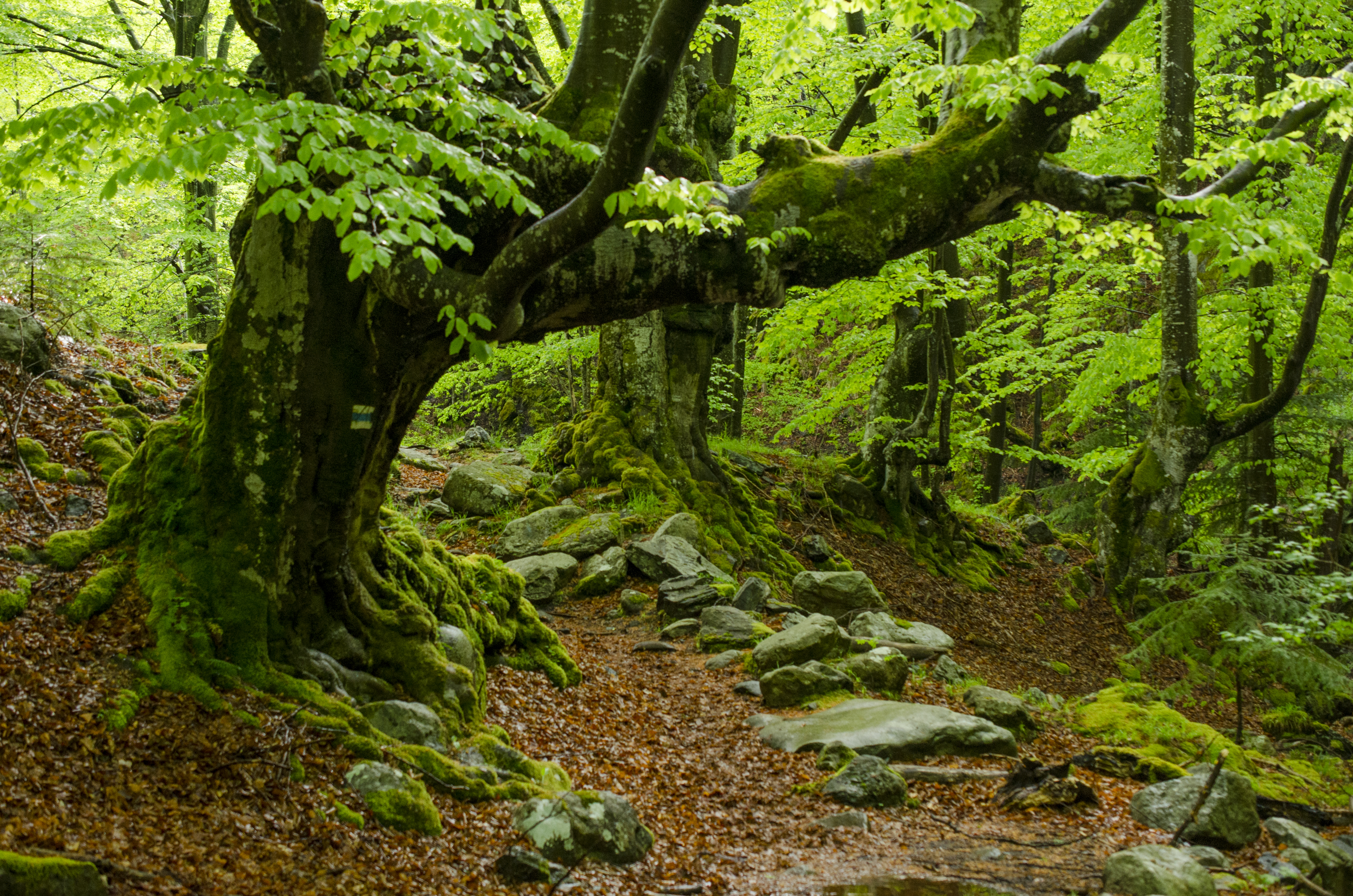 Стара река, По пътеката от Карлово към хижа Левски.